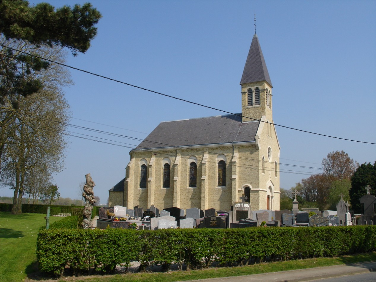 Église de Nielles-lès-Calais